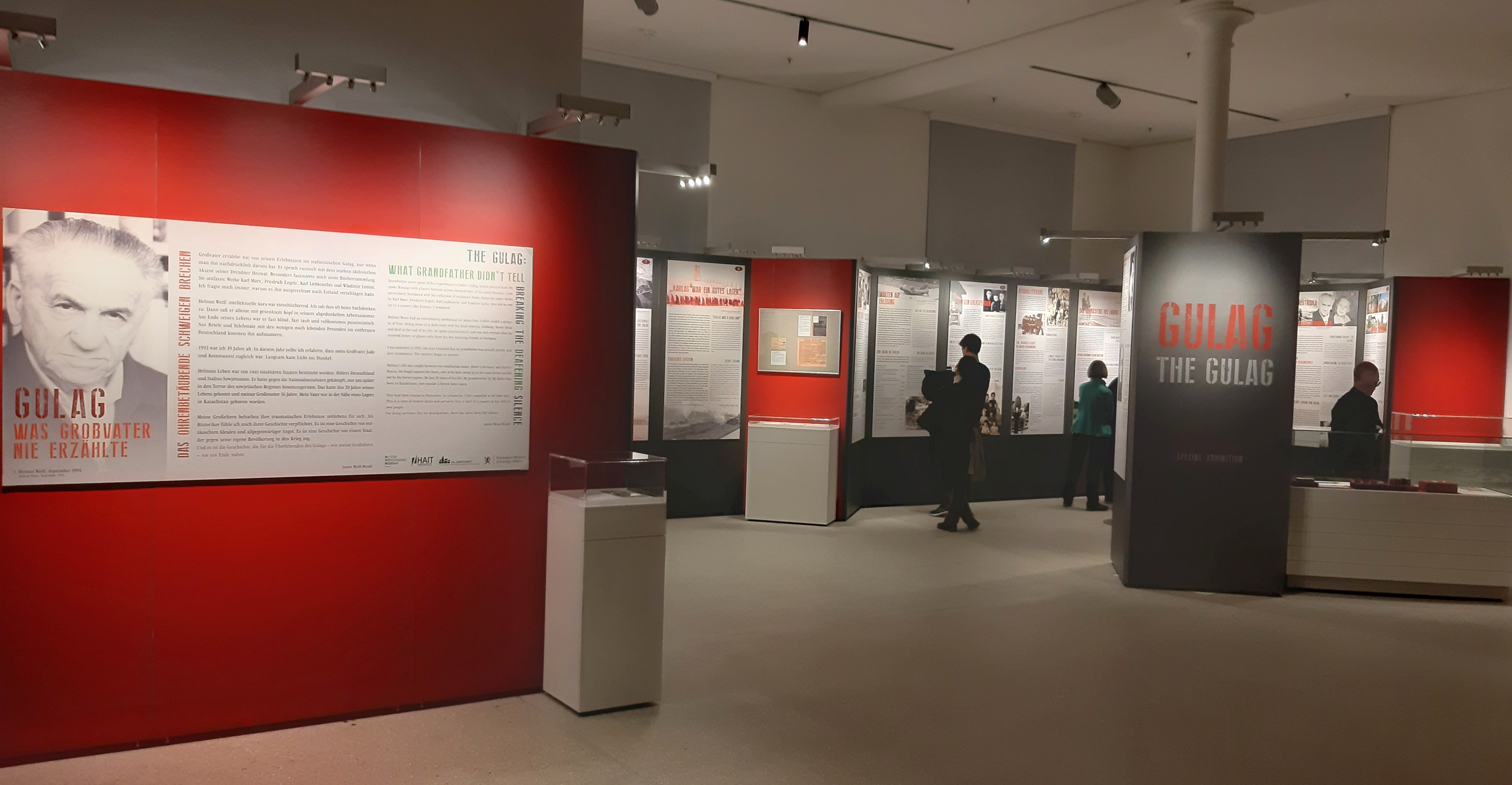 Sonderausstellung "GULAG - WAS GROSSVATER NICHT ERZÄHLTE Die Geschichte des Dresdners Helmut Weiß" im Militärhistorisches Museum der Bundeswehr, Dresden